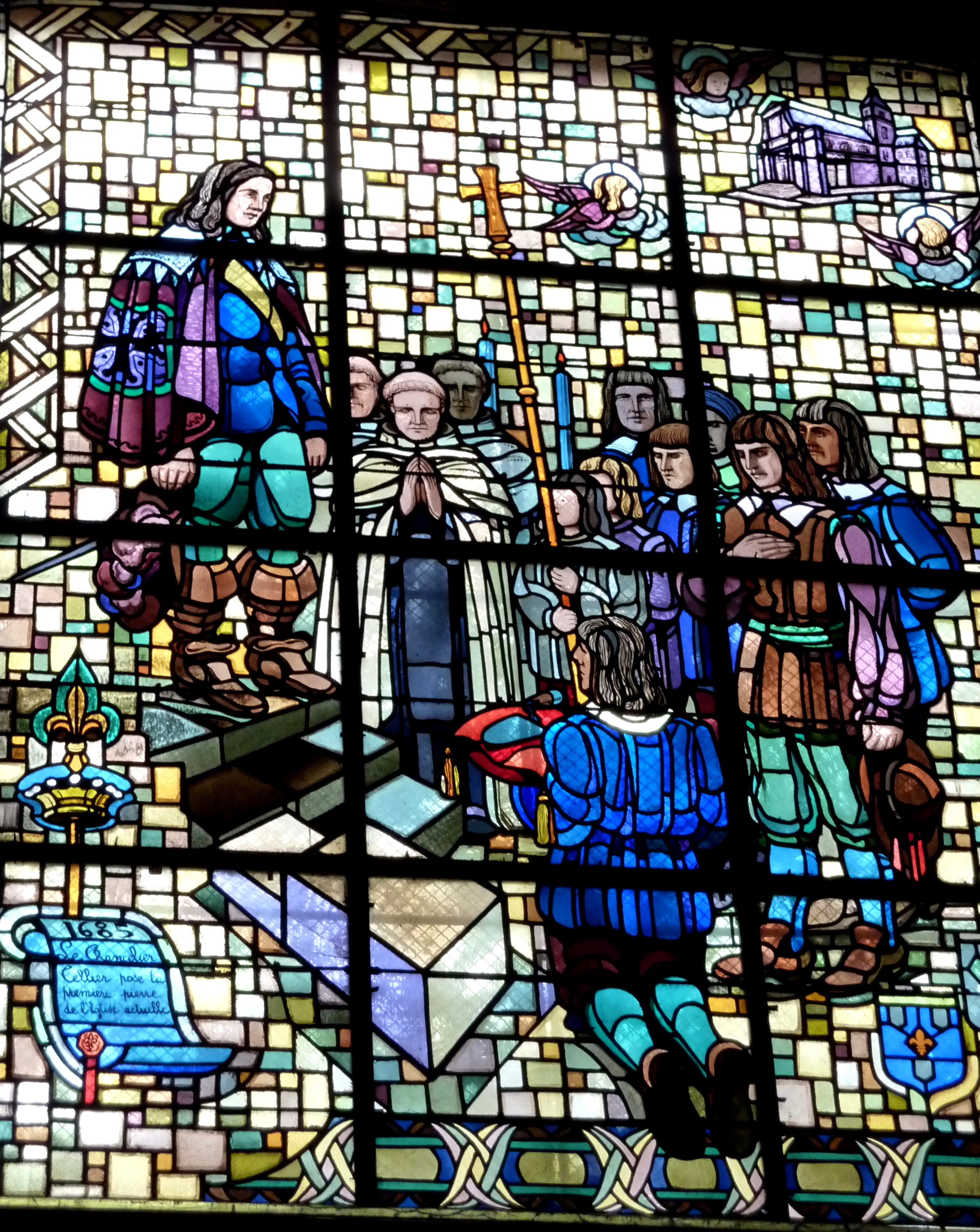 Katholische Kirche Notre-Dame-des-Blancs-Manteaux im 4. Arrondissement in Paris, Fenster im Chorumgang mit der Darstellung der Grundsteinlegung der Kirche; Inschrift: „1685 Le Chancelier (Le) Tellier pose la première pierre de l'église actuelle“ (Der Kanzler Michel Le Tellier legt den ersten Stein der heutigen Kirche)